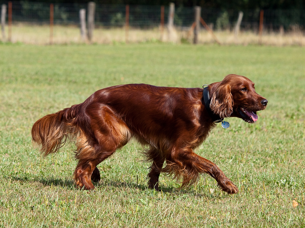 Setter beim anpirschen